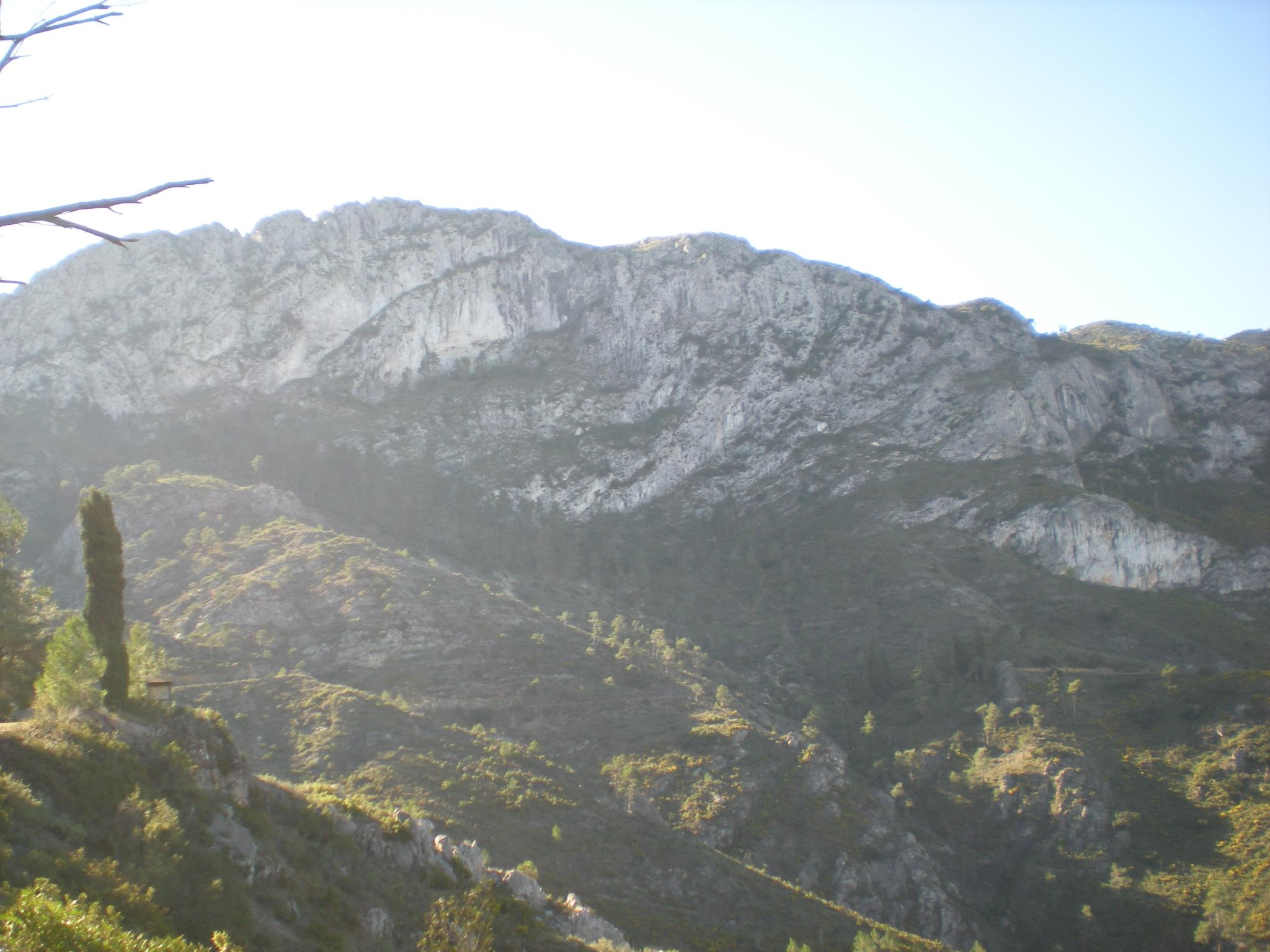 Una de las montañas más elevadas sobre el nivel del mar de la provincia de Valencia